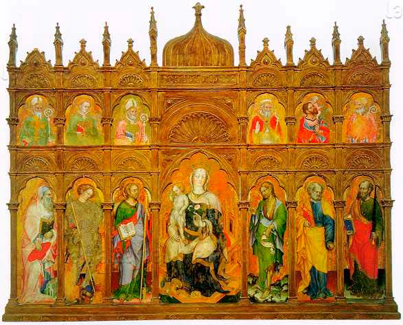 Al centro è rappresentata la Madonna con il Bambino in trono che tiene in mano una rosa, probabile richiamo all'emblema dei Malatesta che potrebbero aver commissionato l'opera. Da sinistra a destra i Santi rappresentati sono: Gerolamo, Michele, Giacomo, Giovanni Battista, Pietro e Paolo. I mezzi busti del registro superiore vengono attribuiti al Maestro di Roncaiette. Questi sono: Sant'Ambrogio, San Lorenzo, un Santo Vescovo, un Santo Papa, San Cristoforo, e un Santo Vescovo. La cornice lignea neogotica è stata realizzata nel 1919.